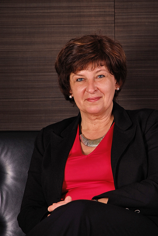 Petra Tiemann, Landtagsabgeordnete Niedersachsen, 16. Wahlperiode (Fotoprojekt Landtagsabgeordnete Niedersachsen am 24. und 25. November 2009)